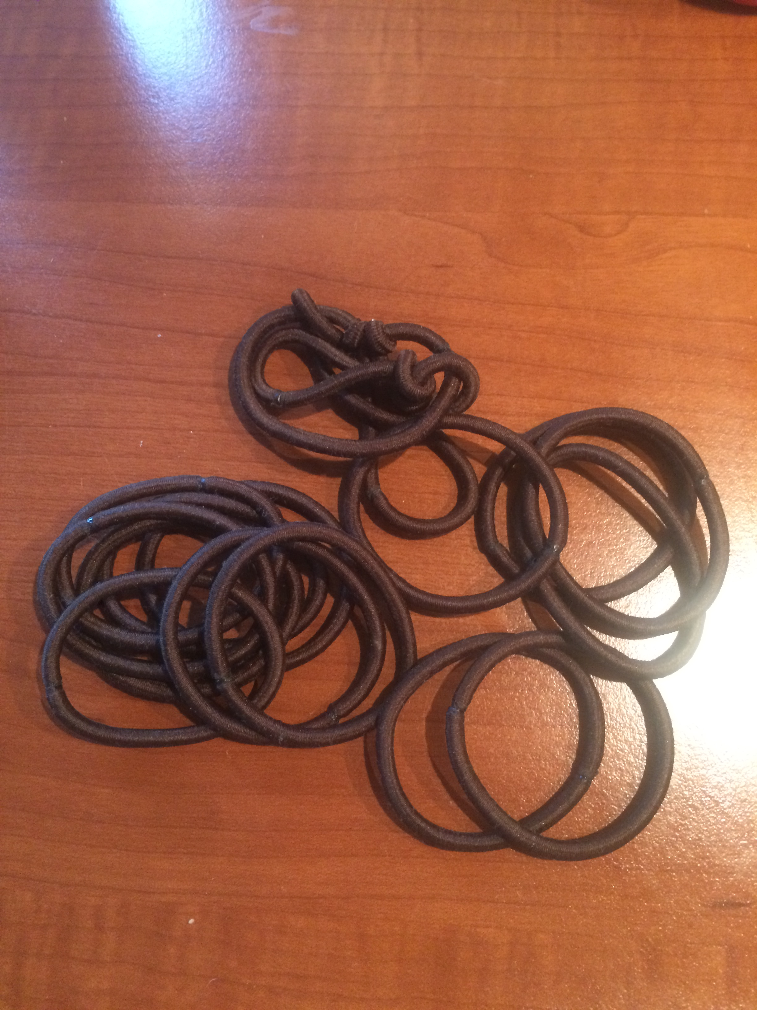 Haargummi